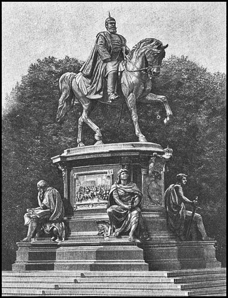 Schwerin, Denkmal Friedrich Franz II. by Ludwig Brunow